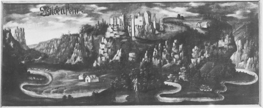 Burg Wildenstein, nach 1554, Öl auf Leinwand (?), Privatbesitz (?)